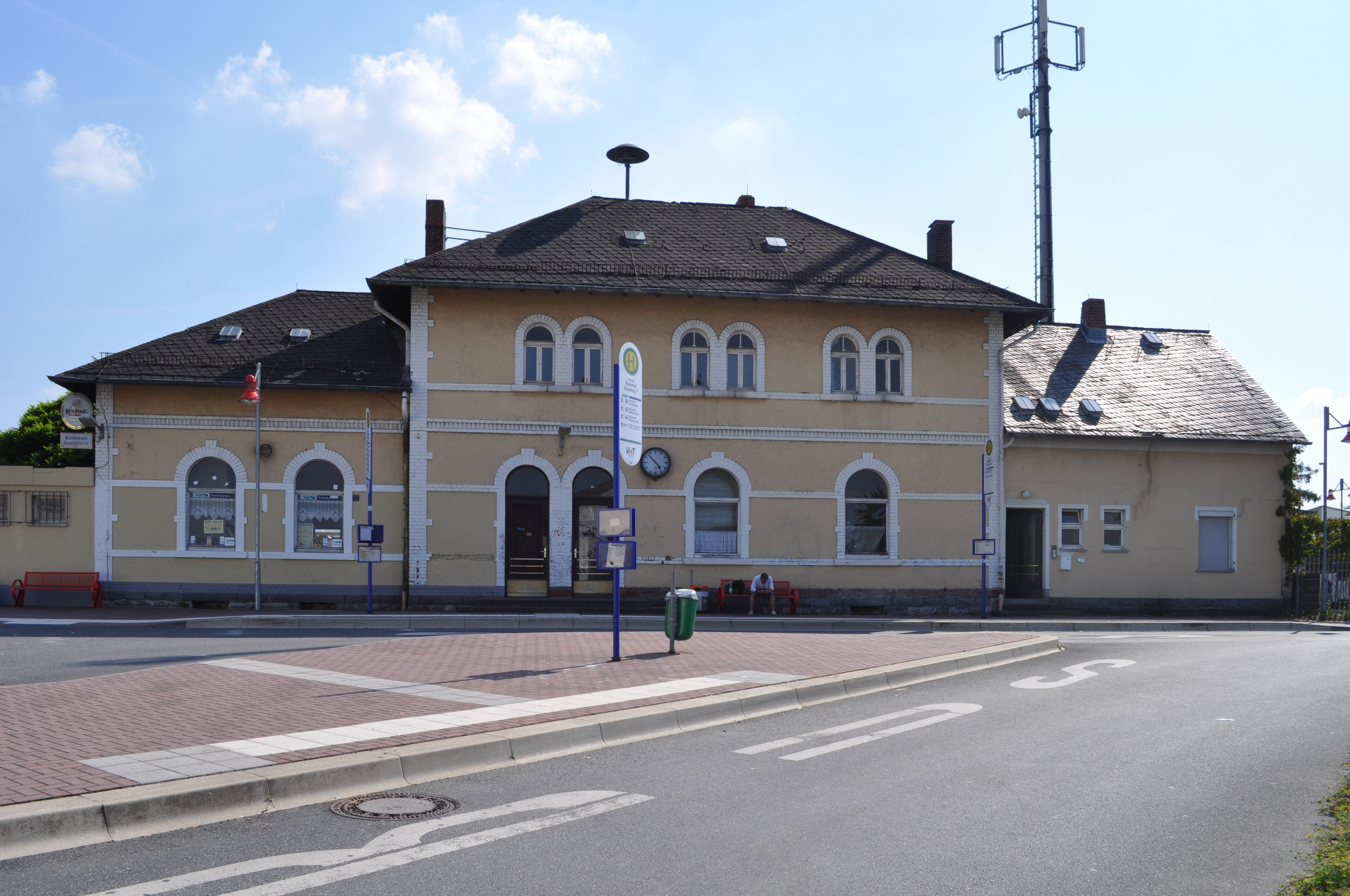 Bahnhofsgebäude Usingen von der Stadt her fotografiert